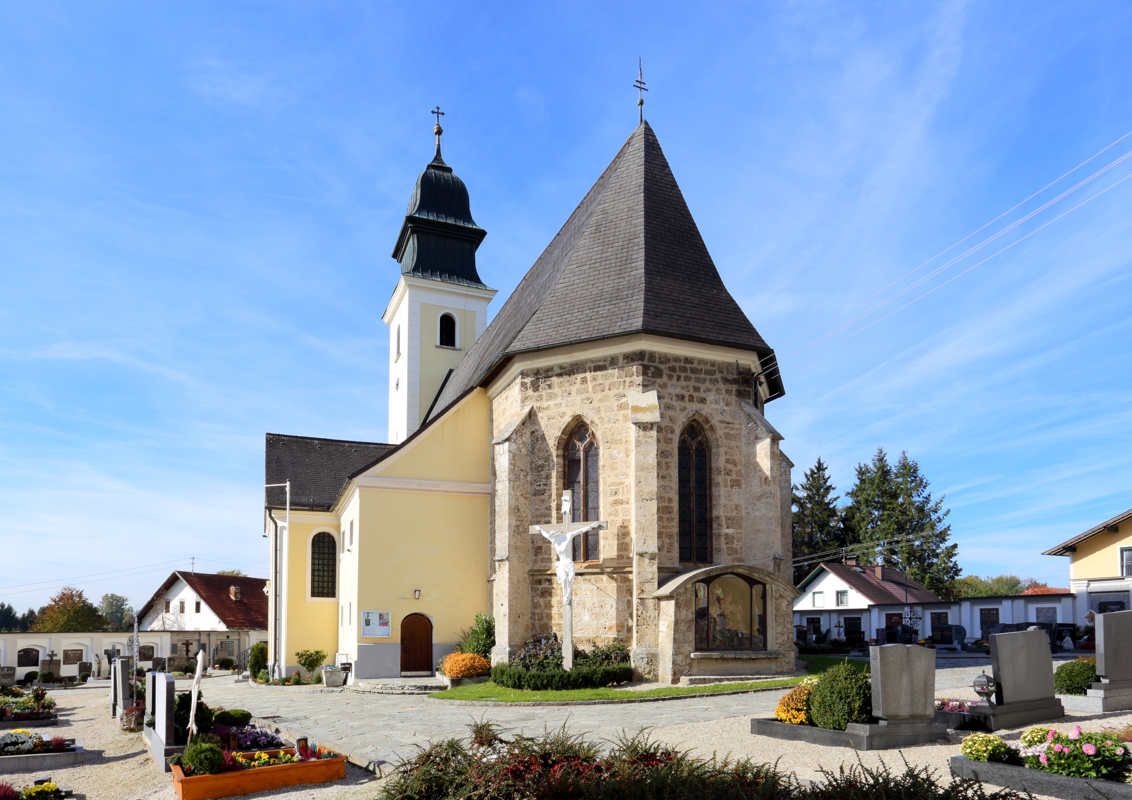 Südostansicht der katholischen Pfarrkirche Mariä Himmelfahrt der oberösterreichischen Gemeinde Weilbach.Ein Tuffsteinbau dessen Langhaus spätbarock ist (1775). Ostseitig angebaut ist ein leicht eingezogener zweijochiger, gotischer Chor mit 5/8-Schluss. Der barocke Westturm mit einer hohen Haube wurde um 1780 errichtet.